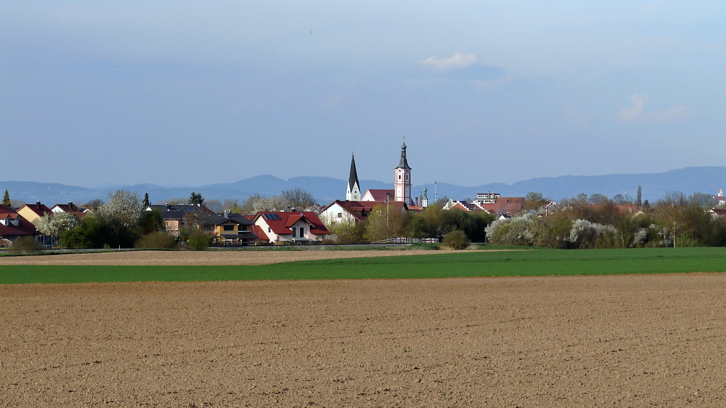 Geiselhöring ist eine Stadt im niederbayerischen Landkreis Straubing-Bogen.